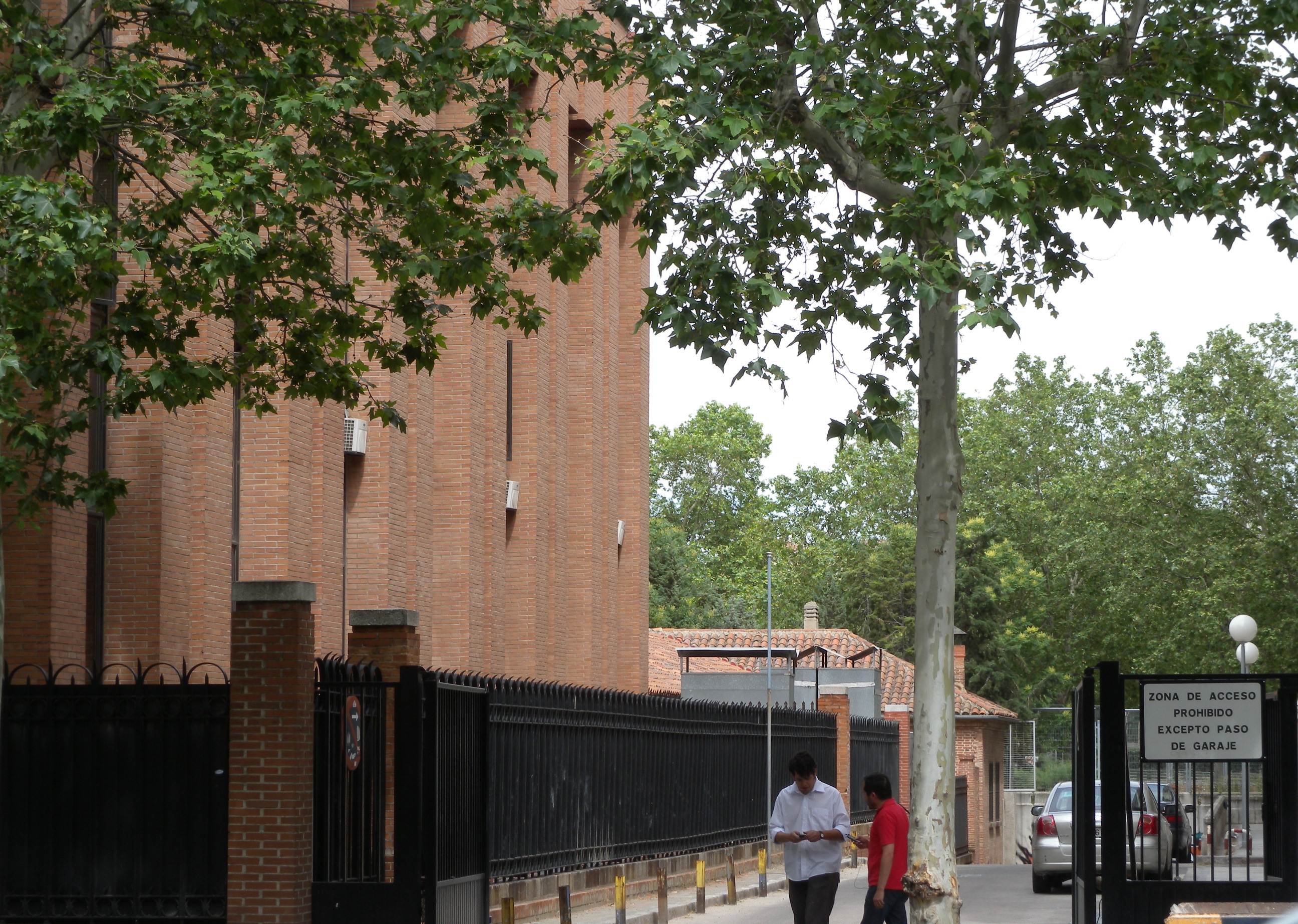 Instituto Geografico Nacional de España